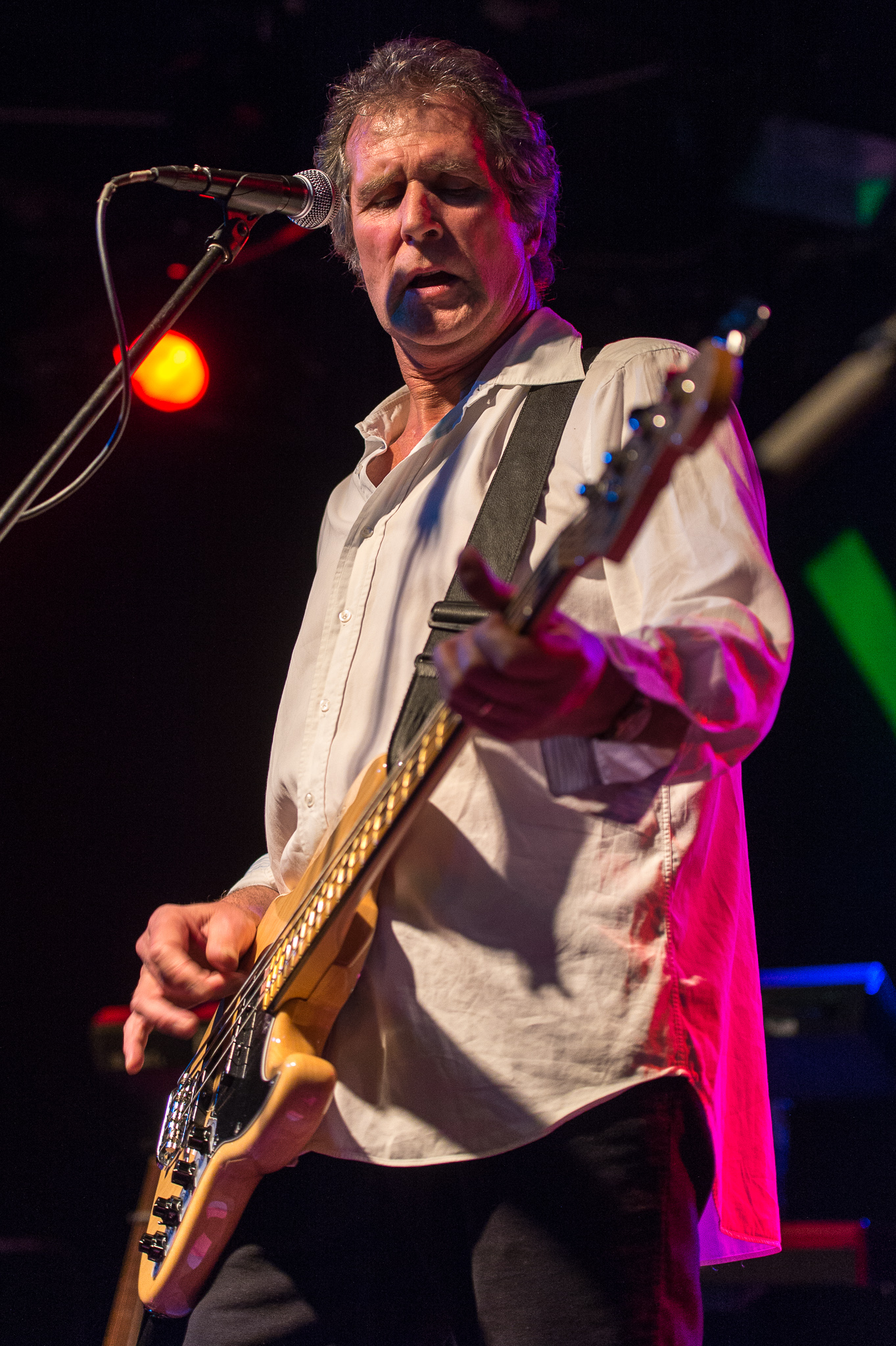 Concertbüro Franken,Der Hirsch,Dire Straits,John Illsley,Konzert,Livekonzert,Livemusik,Musik